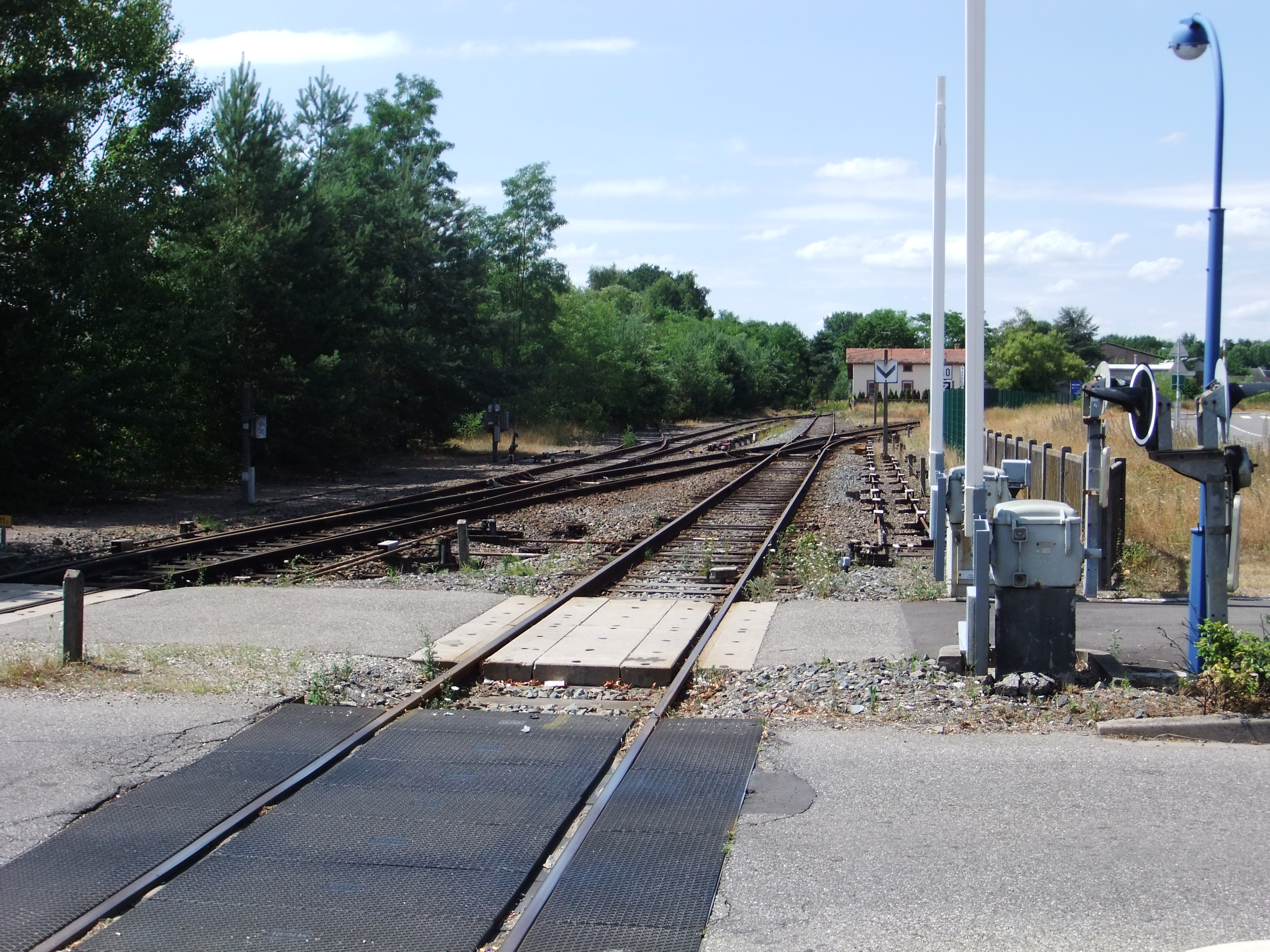 Verzweigung der Strecken Schweighouse - Obermodern (ehemals zweigleisig) und Schweighouse - Niederbronn (stets eingleisig) am Nordende vom Bahnhof Schweighouse, wo die Strecke von Haguenau heute noch zweigleisig ankommt